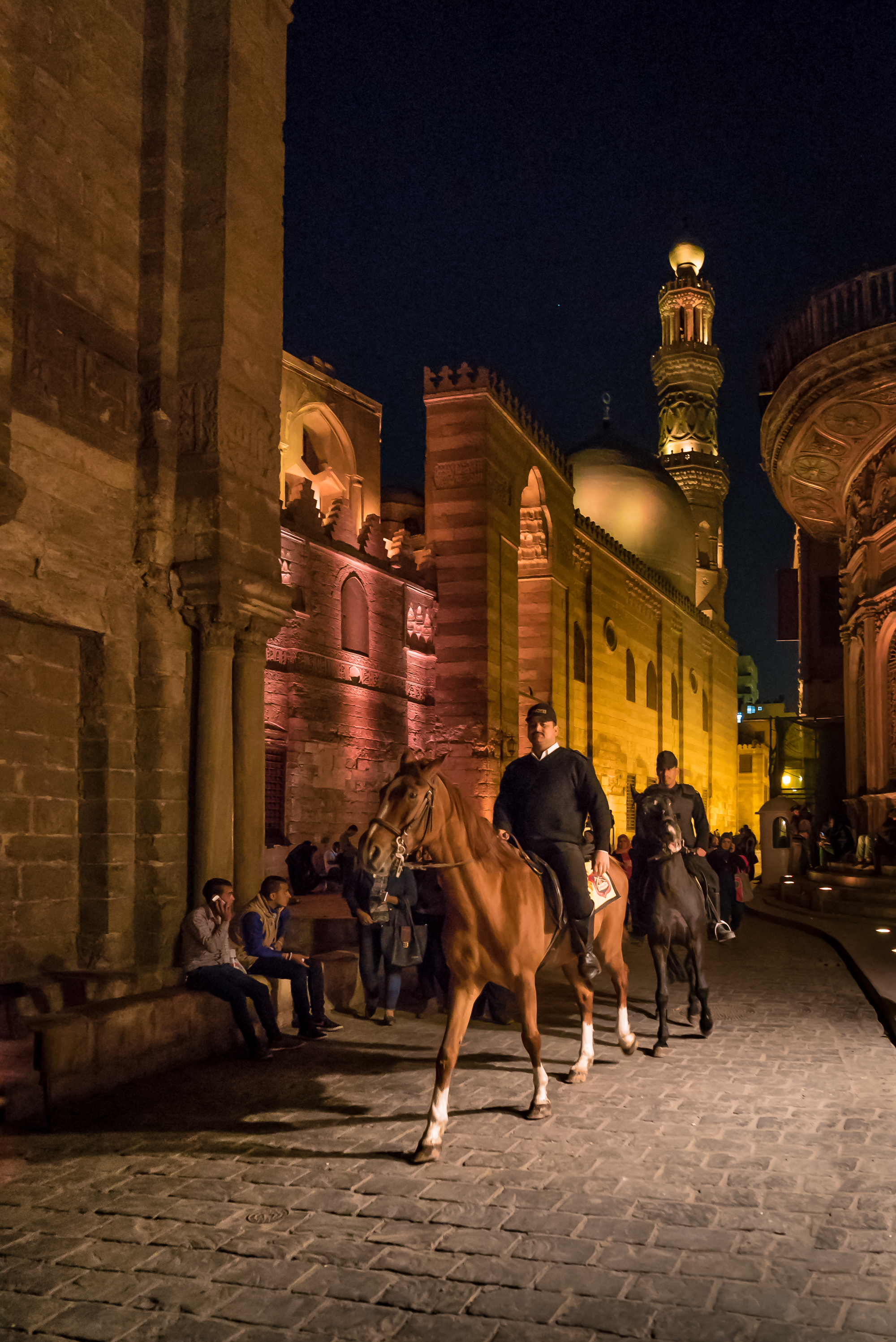 صورة توضح جمال شارع المعز اثناء عبور شرطة السياحة وهى تقود الخيول